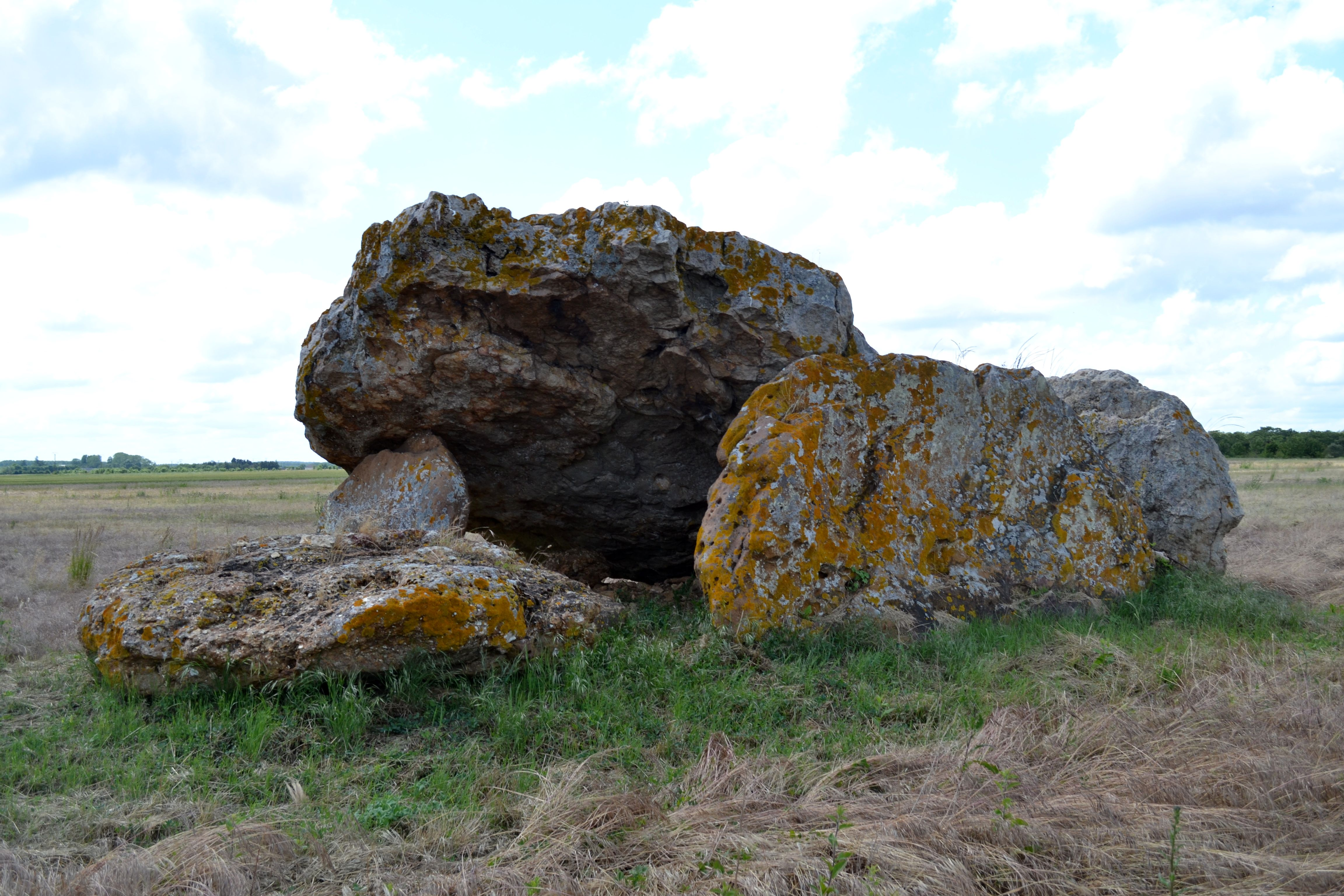 Dolmen de Briande n°2, Arçay (86).